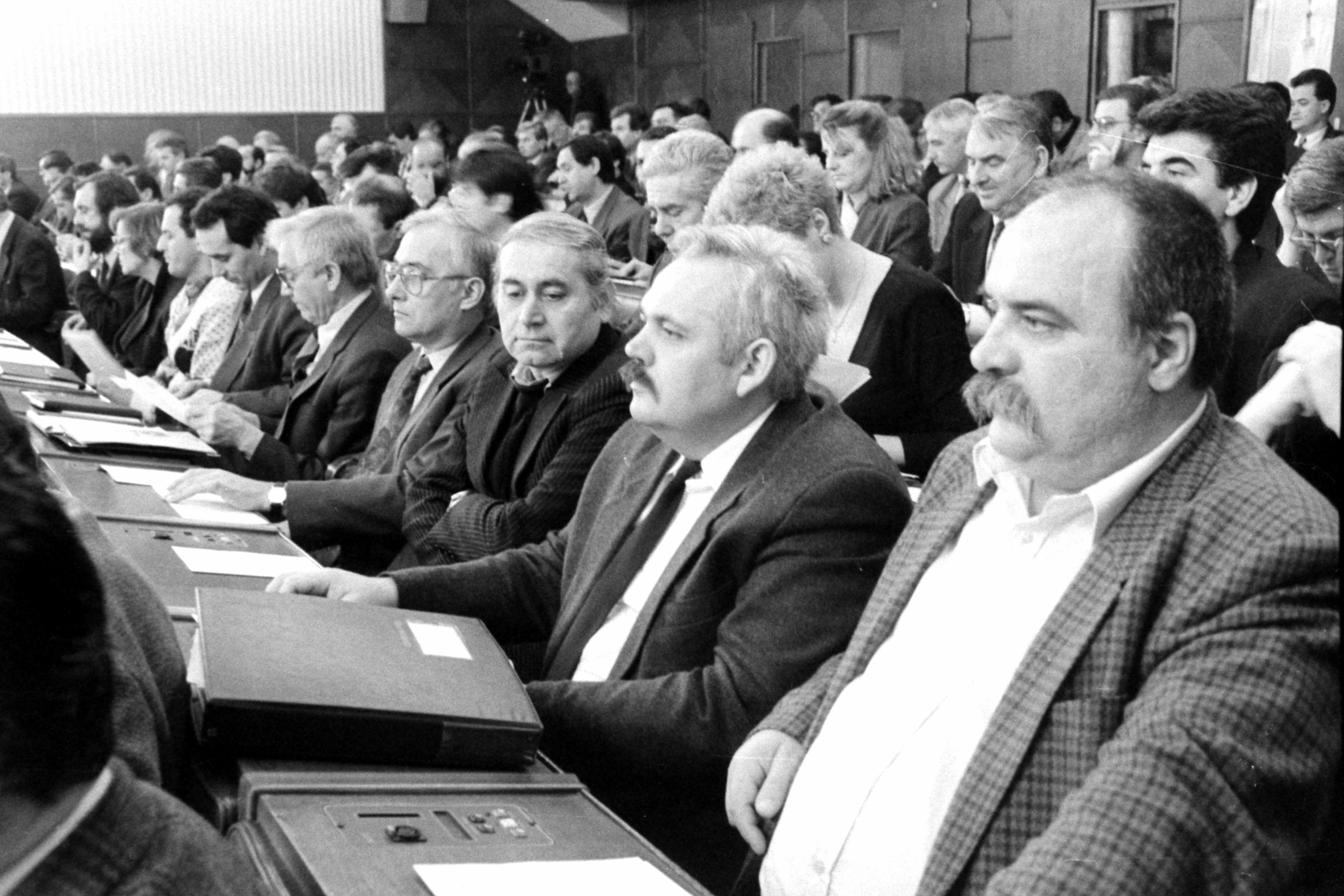 Јожеф Каса(1945-2016)политичар и Шандор Пал(1954-2010) политичари.фото Стеван Крагујевић (по одобрењу кћерке Тање Крагујевић)